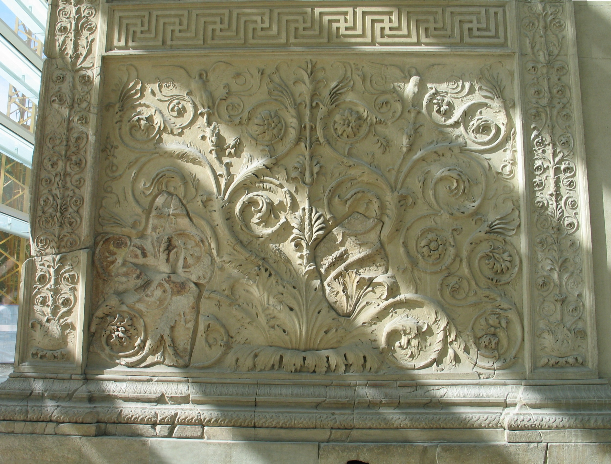 Ara Pacis, detail.